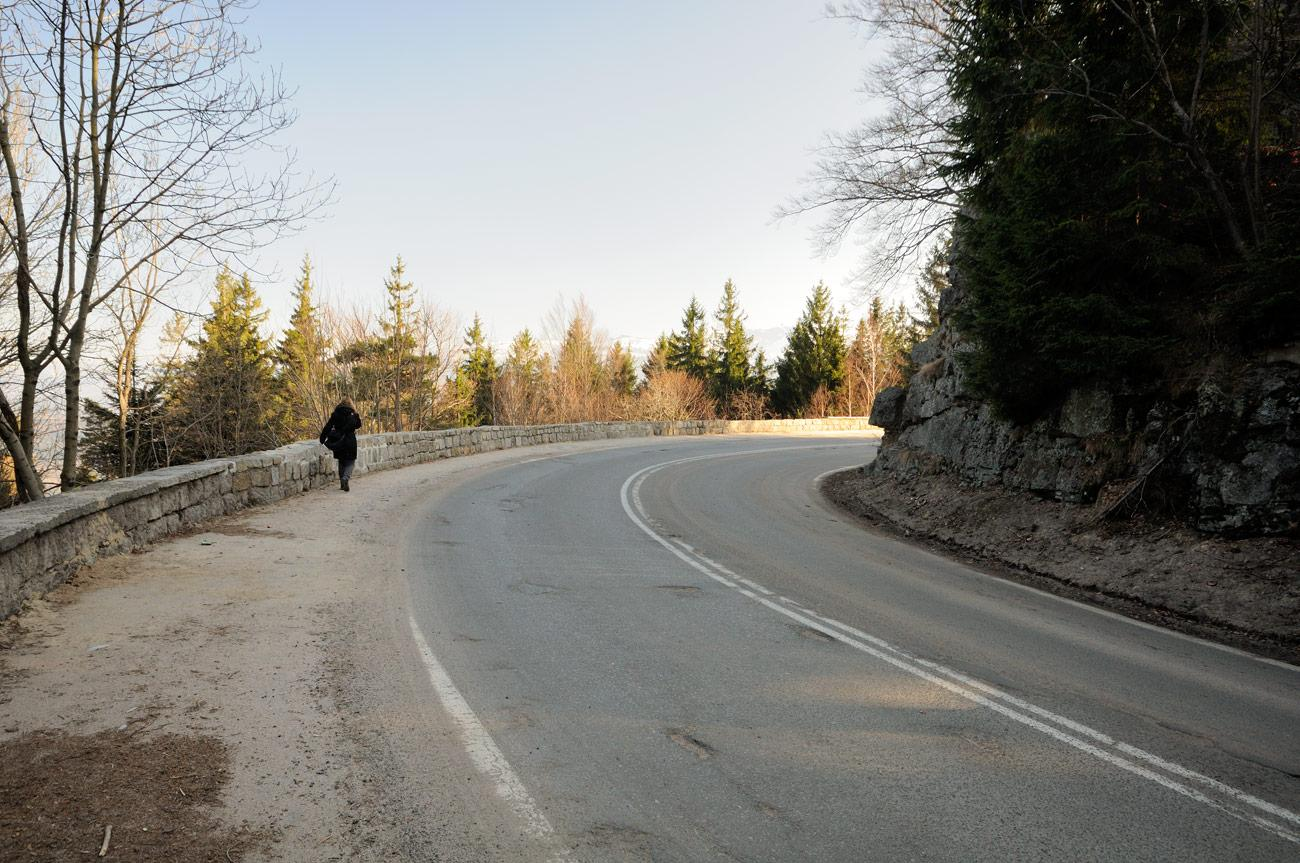 "Zakręt Śmierci" - niestety prawie z każdej strony obrosły go drzewa więc panorama gór jest przez nie w większej części przesłonięta.